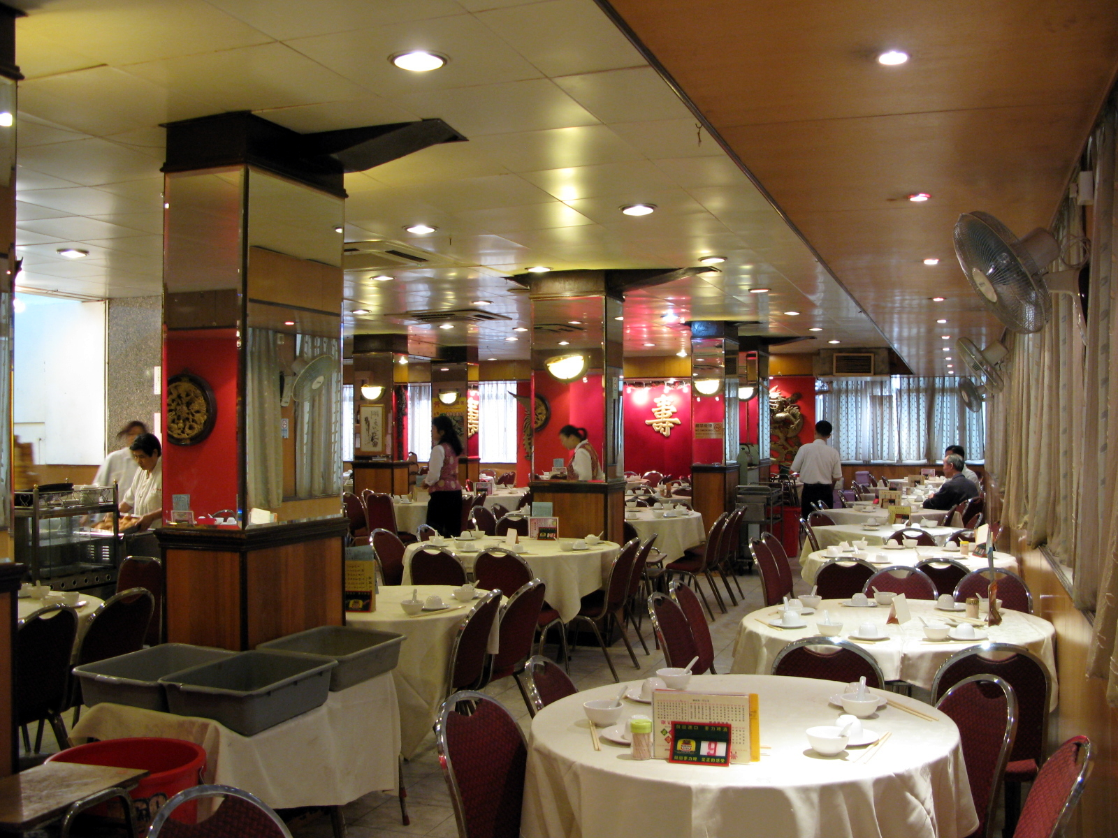 Lung Moon Restaurant 龍門大酒樓